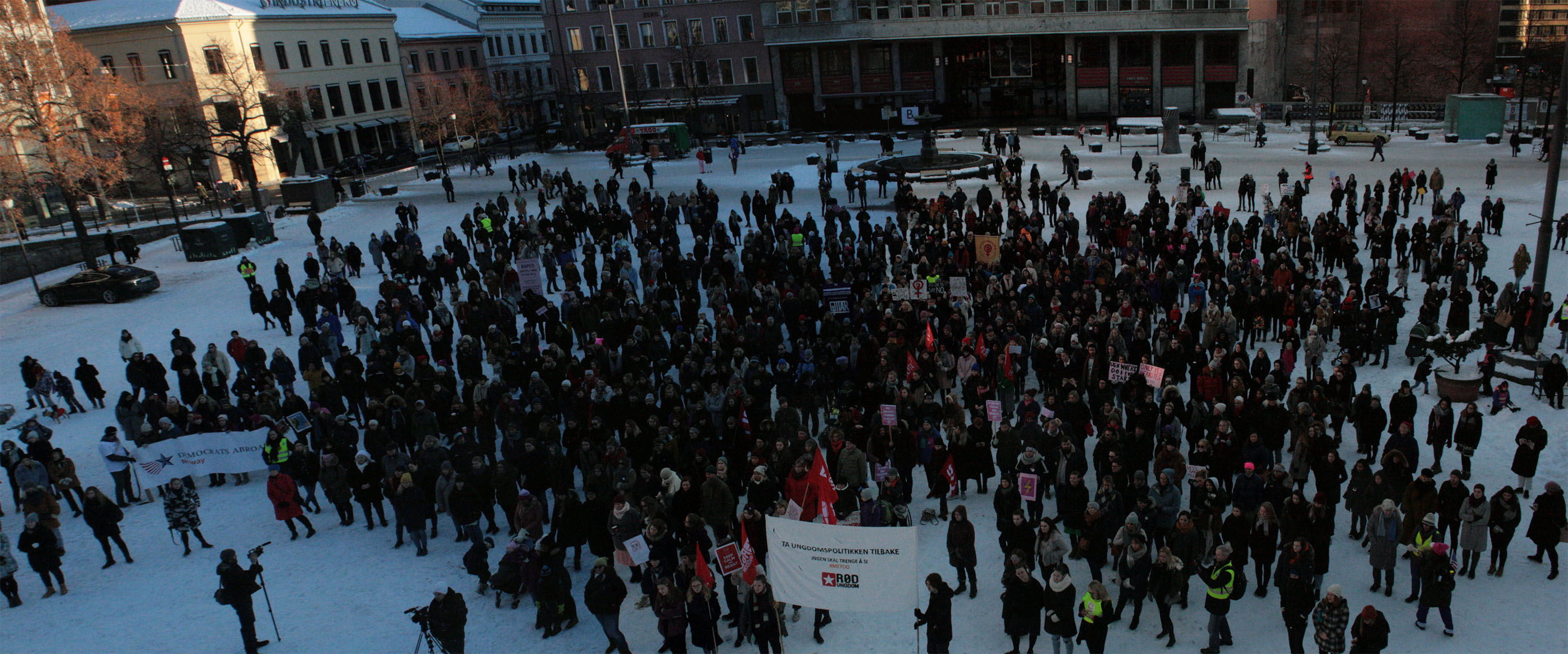 torget